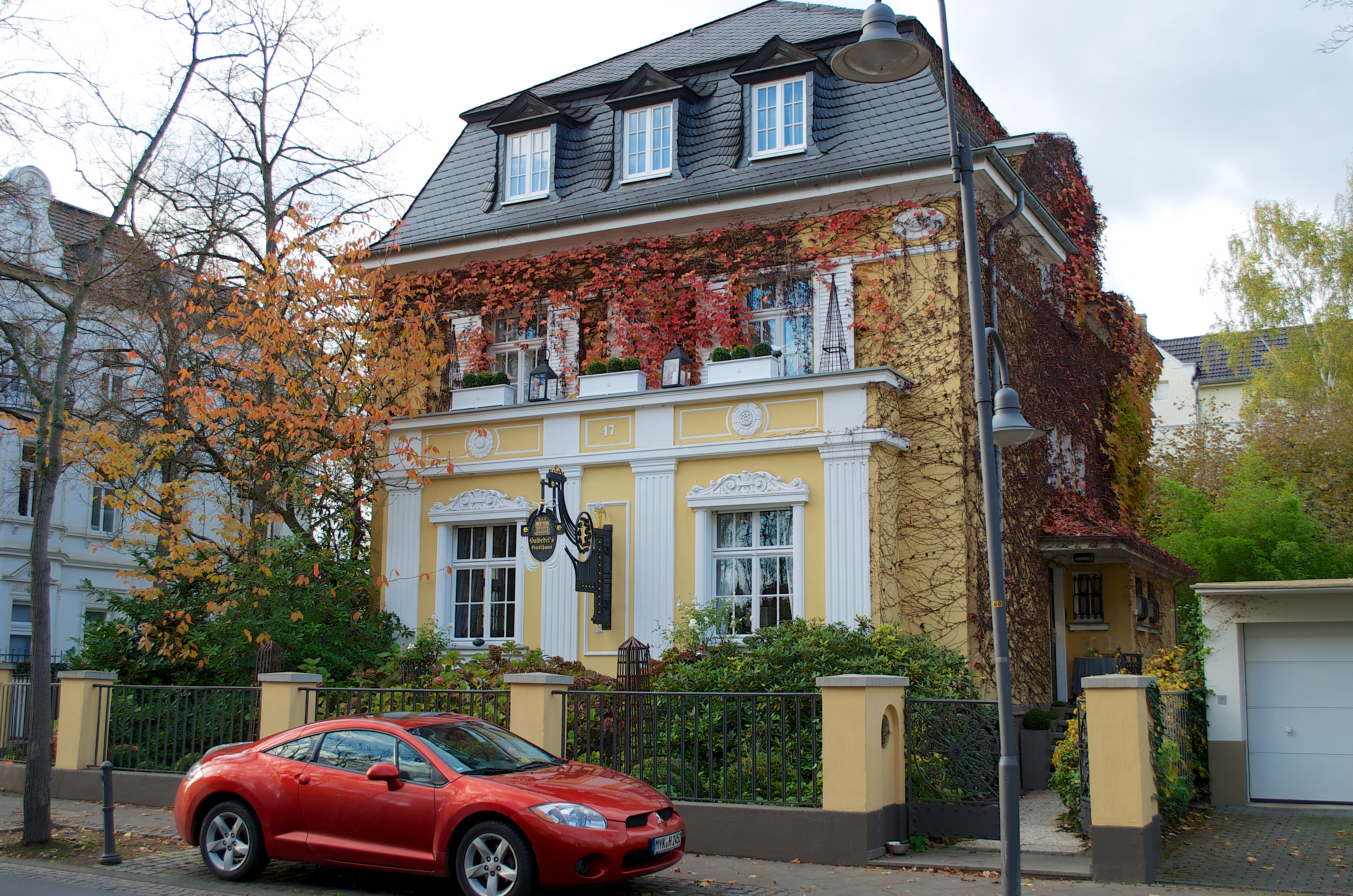 Denkmalgeschütztes Wohnhaus, Rheinallee 47, Bad Godesberg (Ortsteil Godesberg-Villenviertel). Es beherbergt das Sterne-Restaurant "Halbedel's Gasthaus".